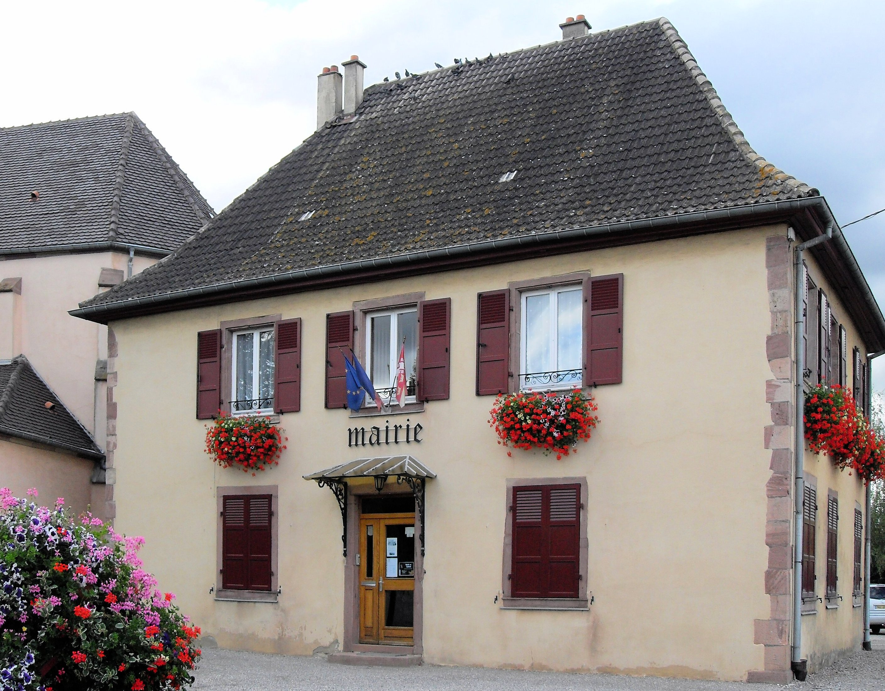 La mairie deRaedersheim